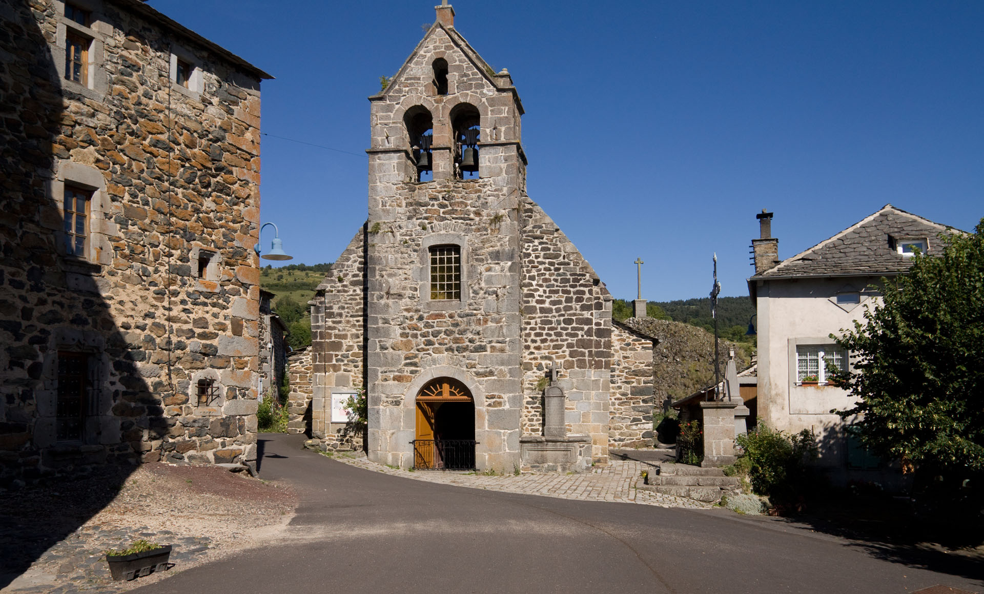 Place de l'église à Montusclat